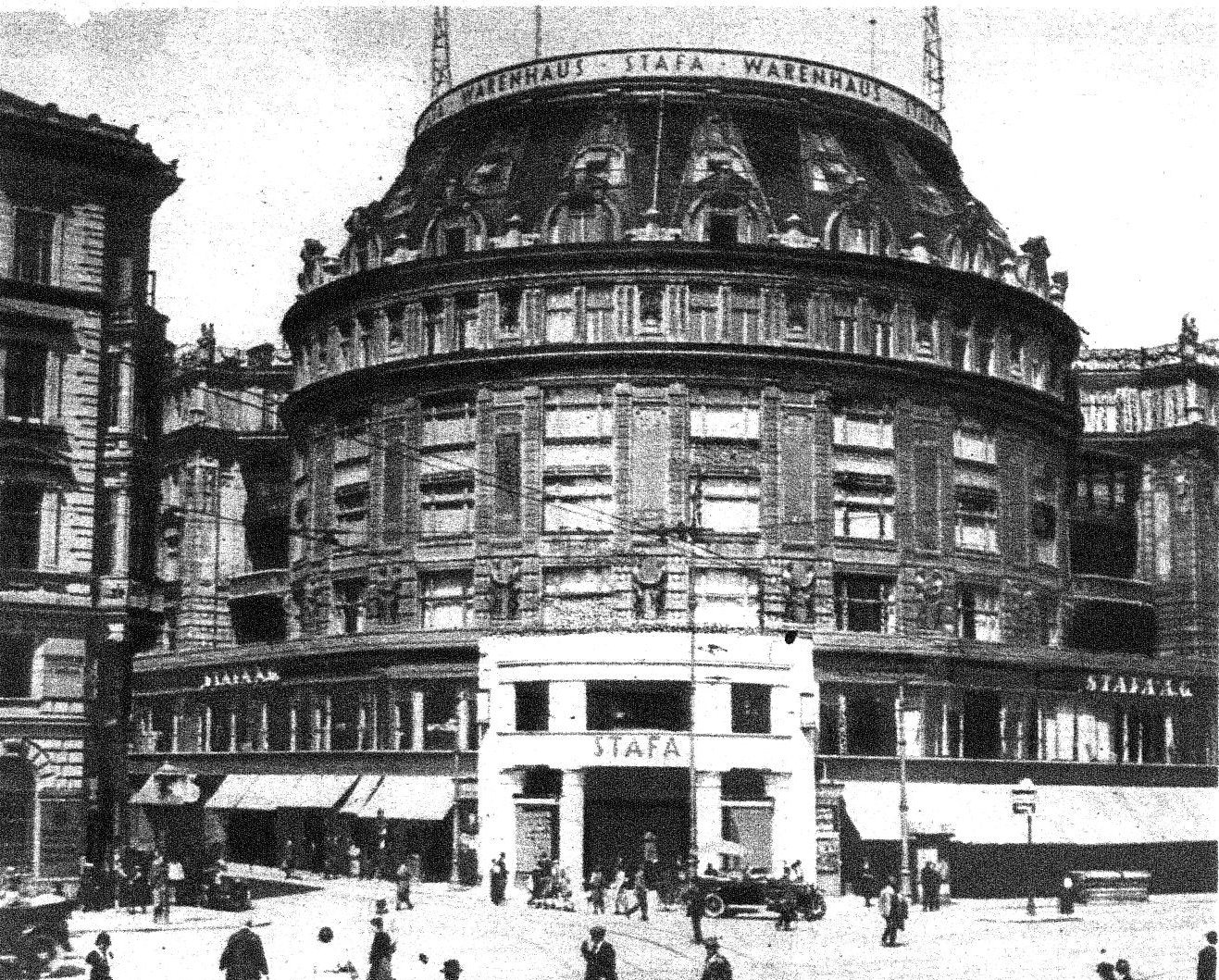 Mariahilfer Zentralpalast (Warenhaus Stafa), 1925 / department store "Stafa", Vienna 1925